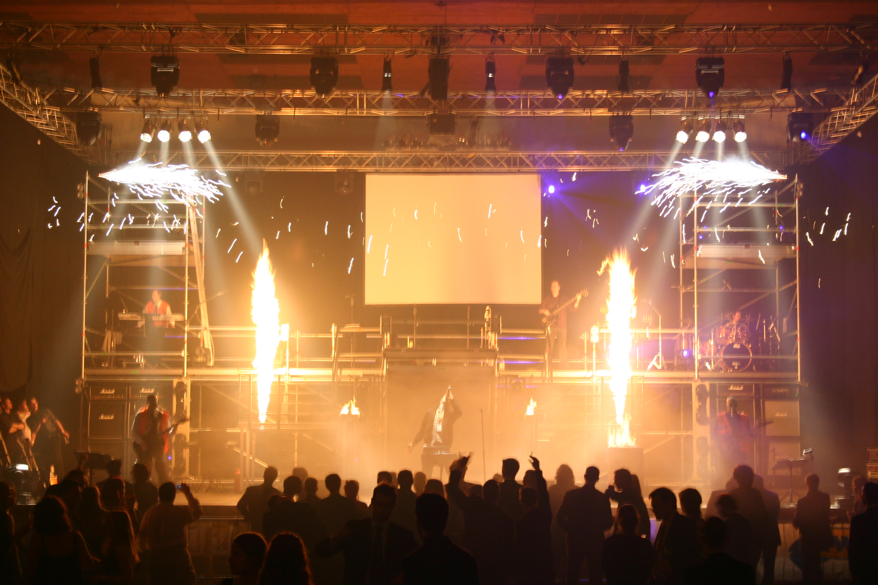 D'Providers um Lécker Bal 2005.